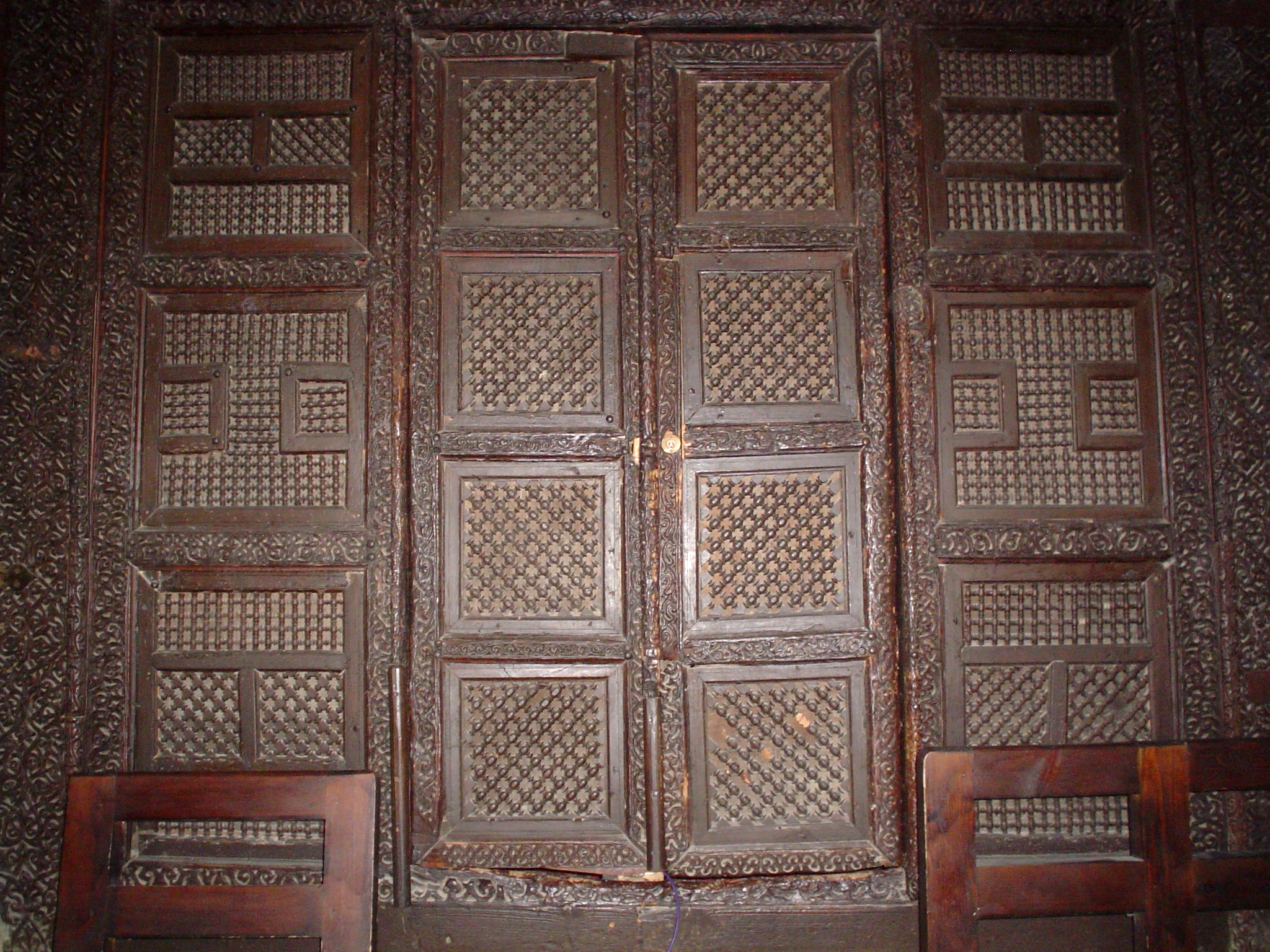 Gros plan sur la porte de la maqsura de la Grande Mosquée de Kairouan, en Tunisie.